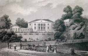 Stahlstich von Poppel und Kurz nach einem Gemälde von Julius Gottheil. Verlag B.S.Berendsohn in Hamburg, um 1855